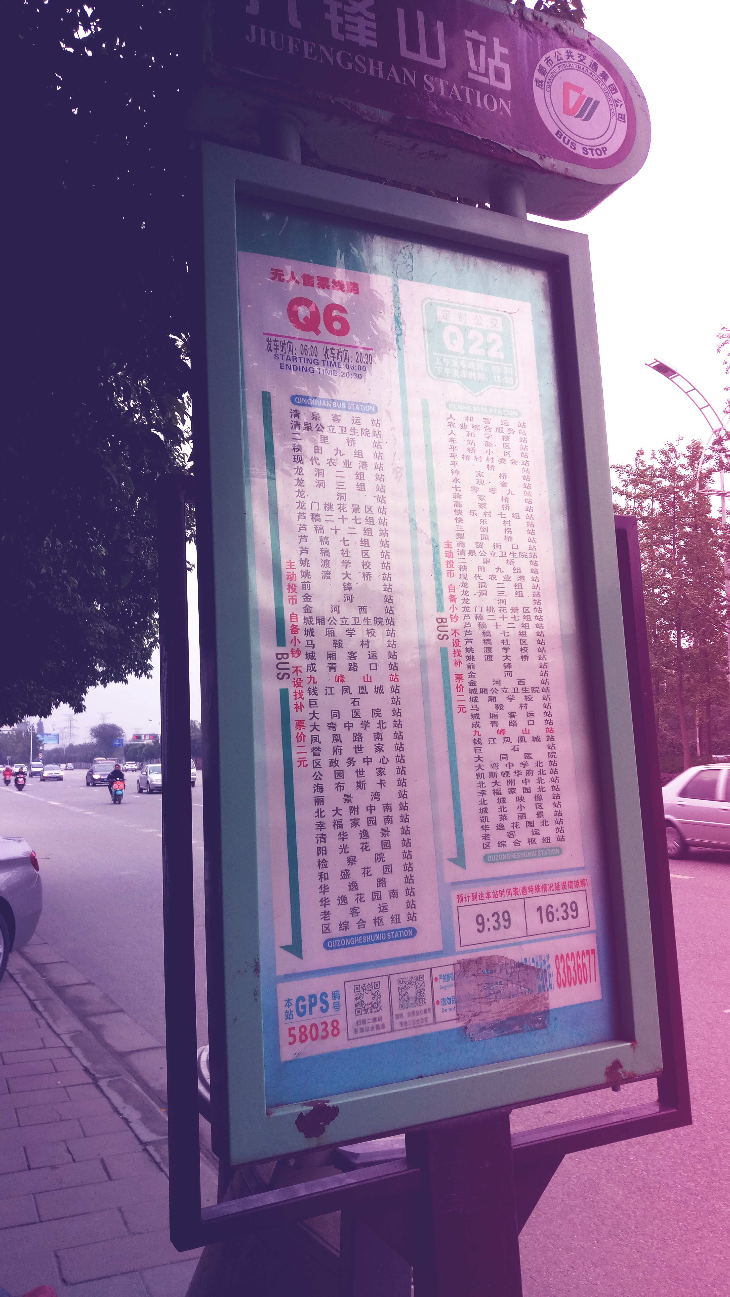 中文（中国大陆）: 成都公交集团青白江巴士公交公司所使用的站牌